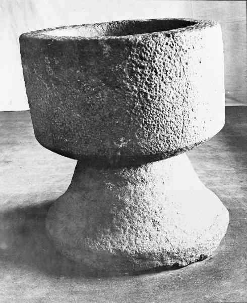 Dopfunt. Kategori: (04) DopfuntarDopfunt.